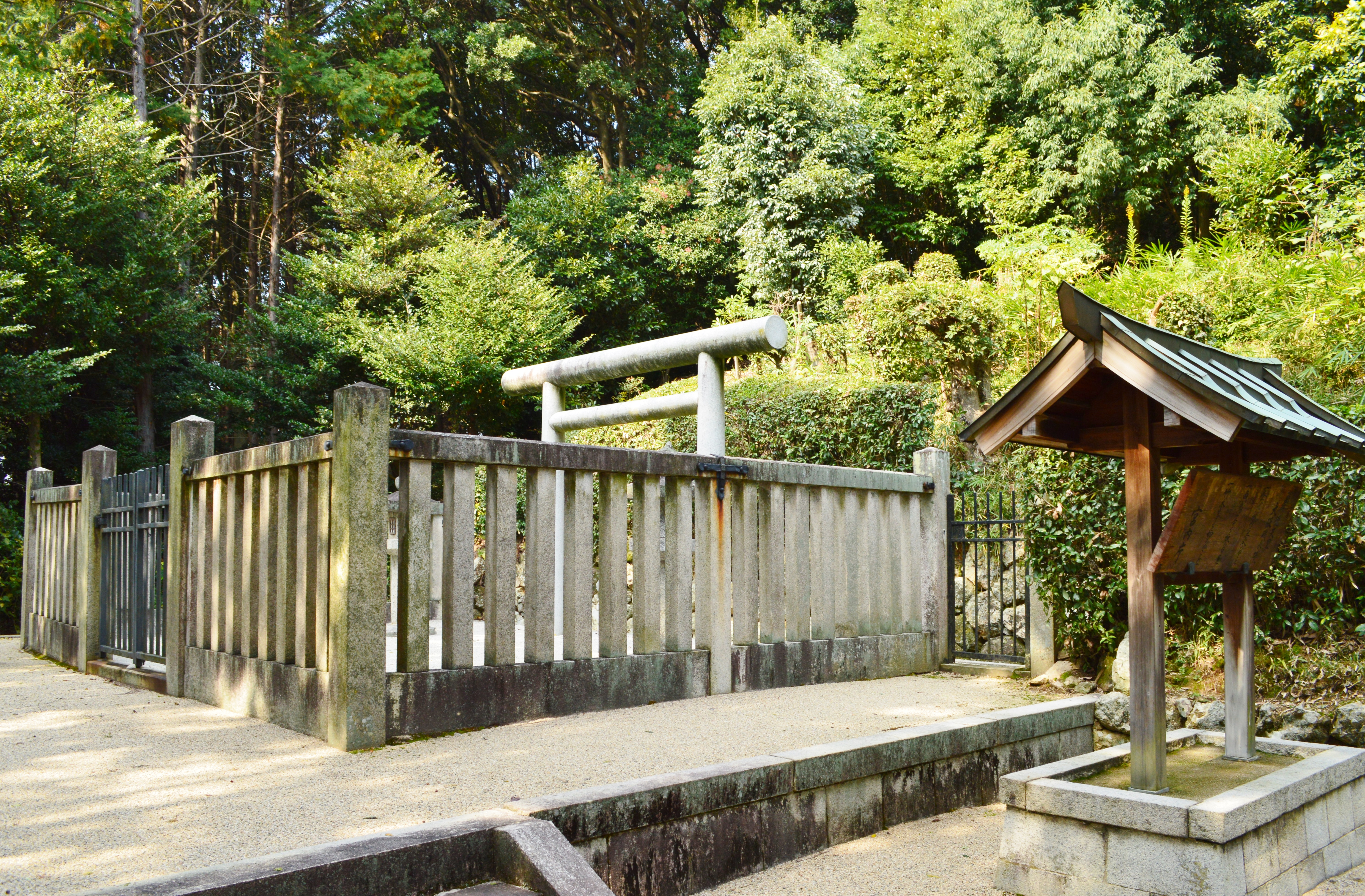 孝徳天皇大阪磯長陵 拝所